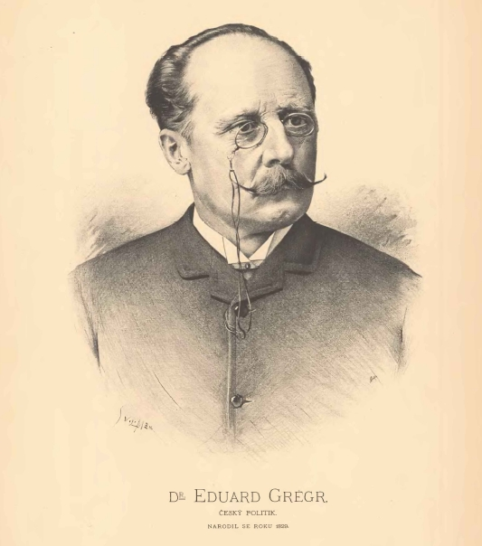 Portréty českých osobností od Jana Vilímka